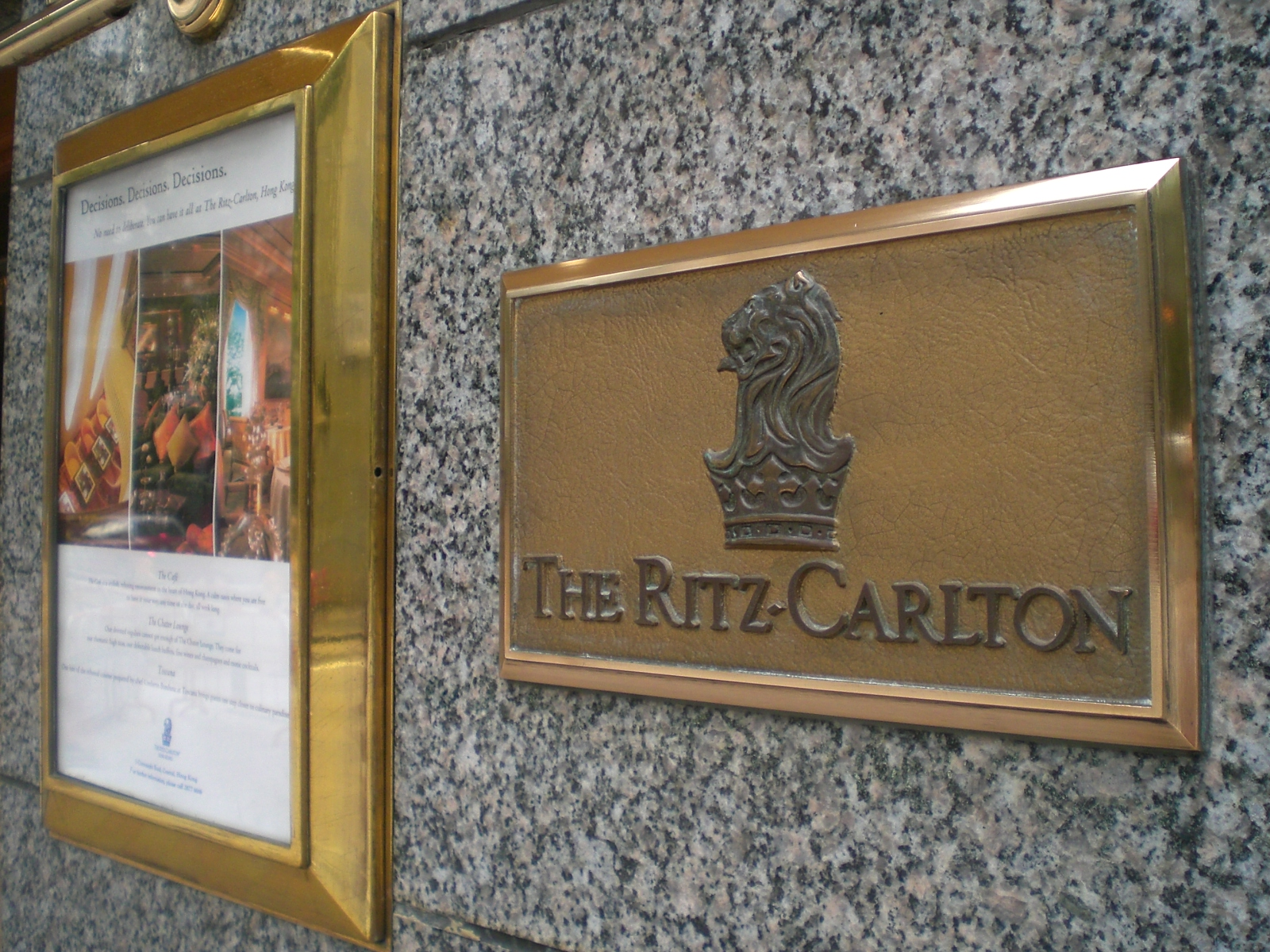 麗嘉酒店，全名為香港麗嘉酒店(Ritz-Carlton Hotel Hong Kong)，為zh:香港的一間五星級酒店，位處於香港zh:中環zh:干諾道中3號。 酒店鄰近zh:香港地鐵zh:中環站和商業區。 麗嘉酒店之東鄰zh:美國國際集團大廈、西鄰zh:香港會、北鄰zh:愛丁堡廣場、南鄰zh:遮打花園。 Photo author is me, User:Kwanyatsw